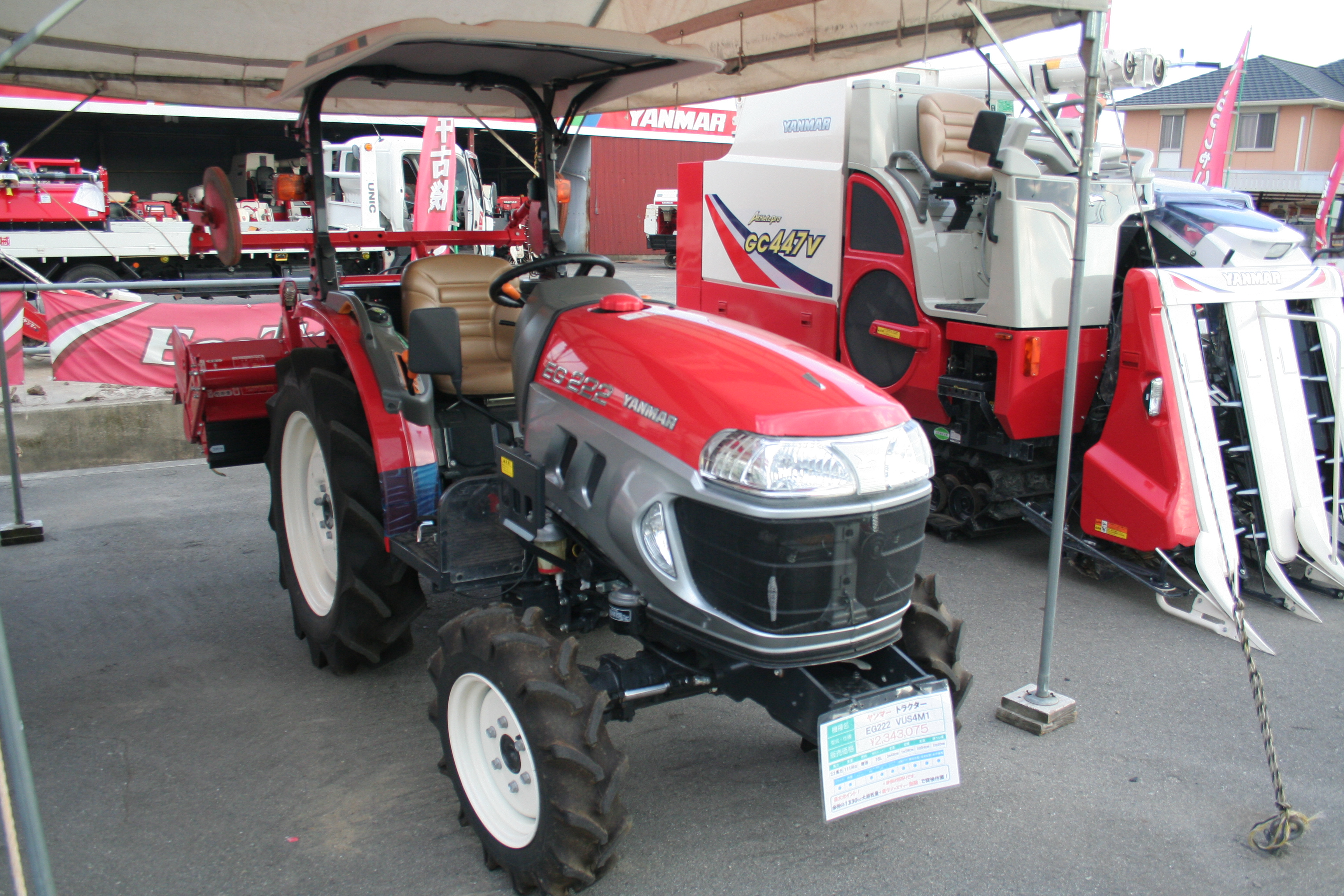 日本の農作業用機械。農作業用トラクター。